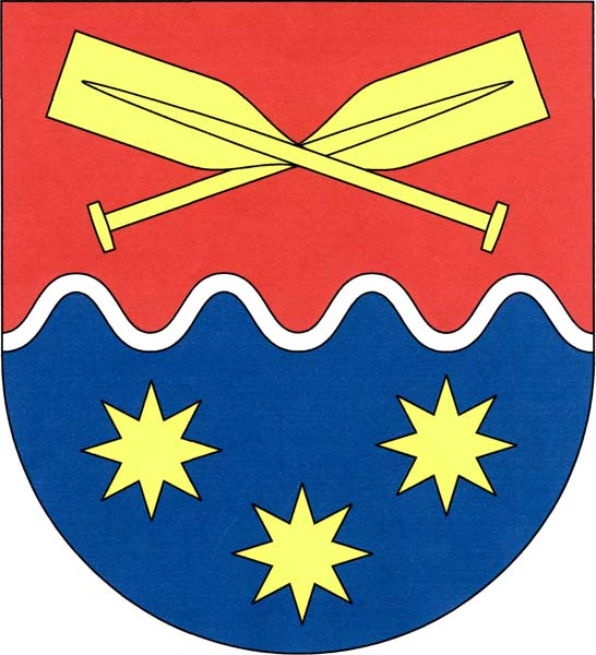 Znak obce Krhanice